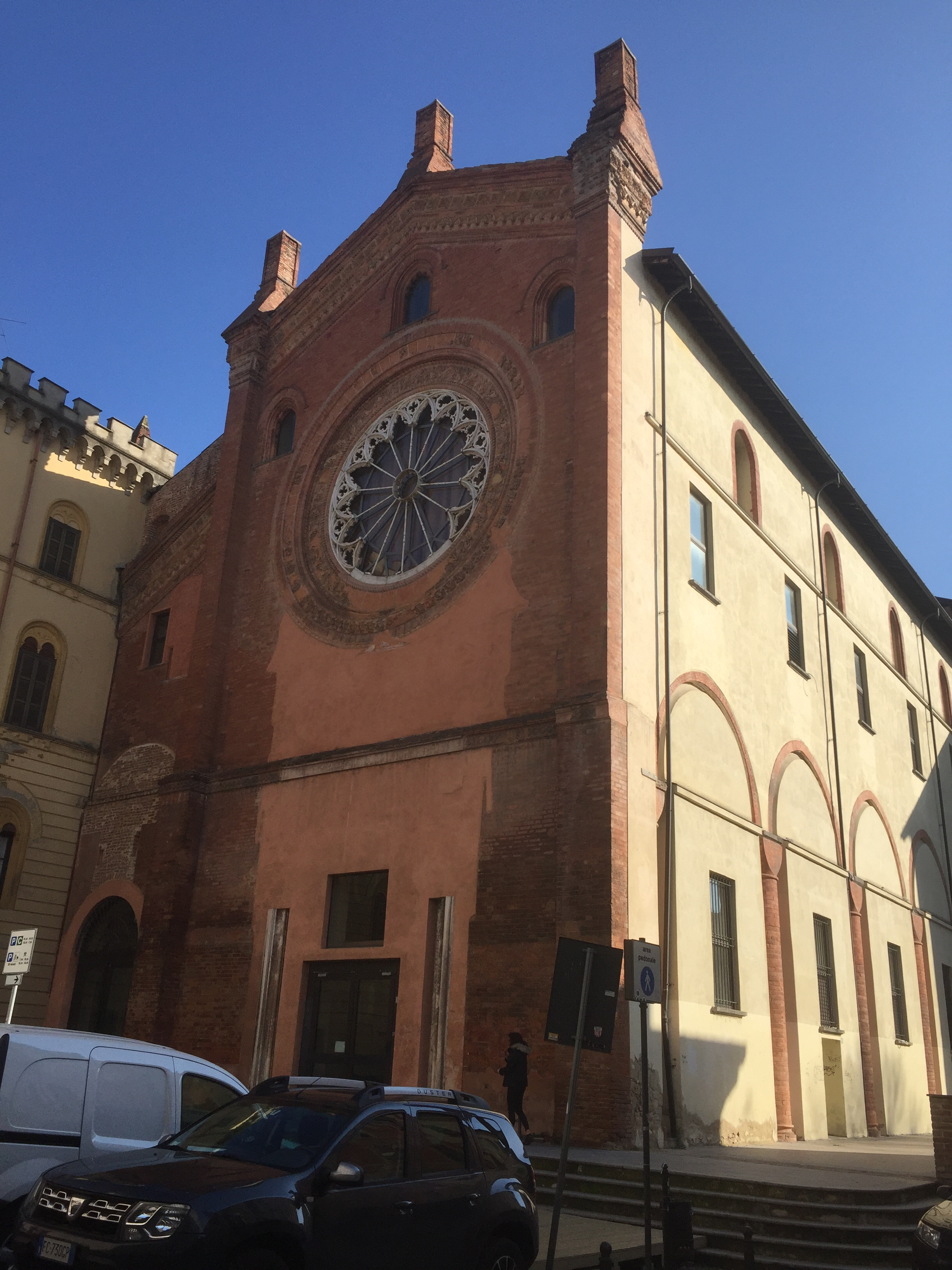 Pavia Chiesa di San Tommaso